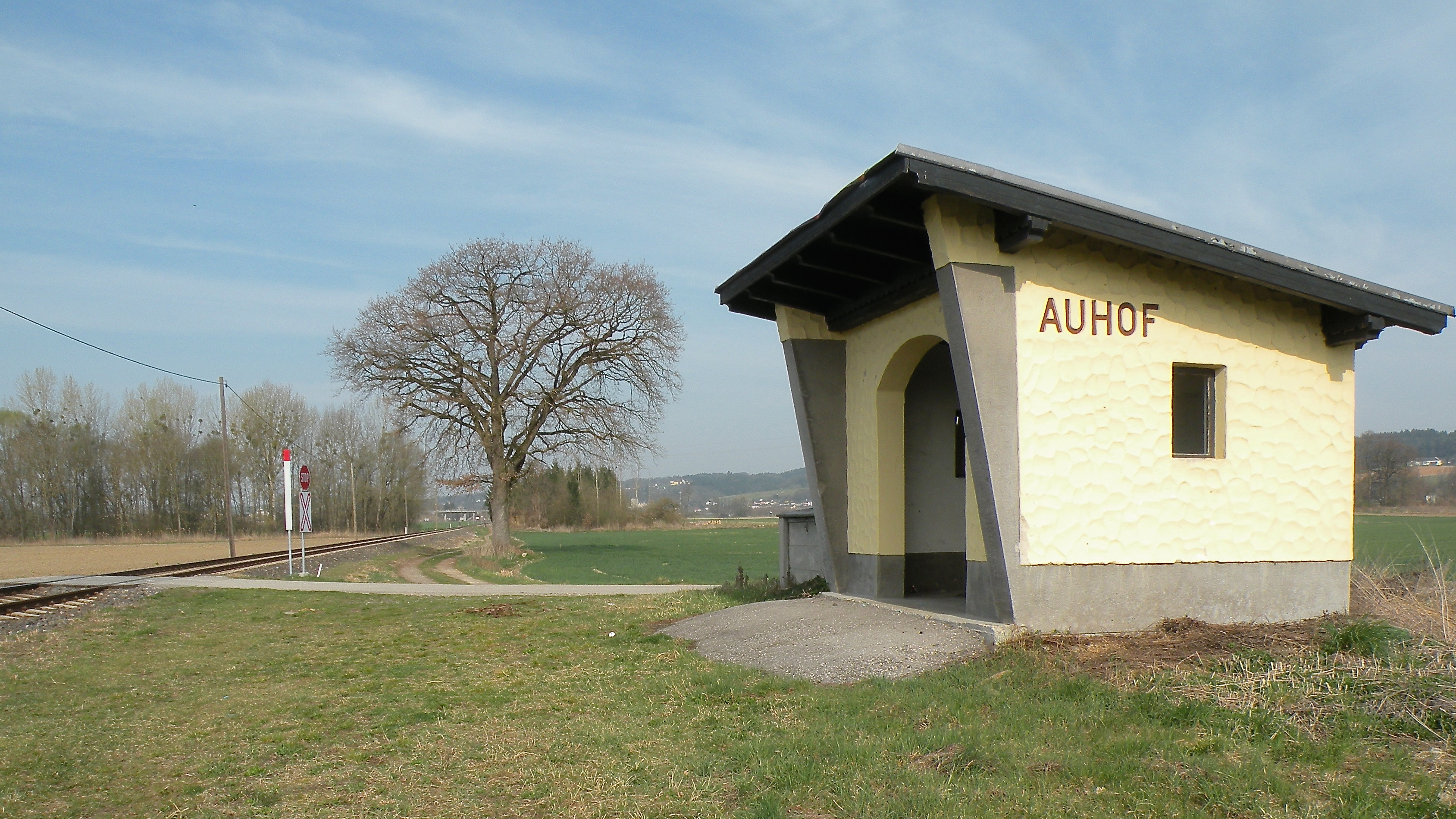 Aufgelassene Haltestelle der Donauuferbahn (Wachau) im Ortsteil Auhof der Katastralgemeinde Pergkirchen in der Stadt Perg in Oberösterreich.